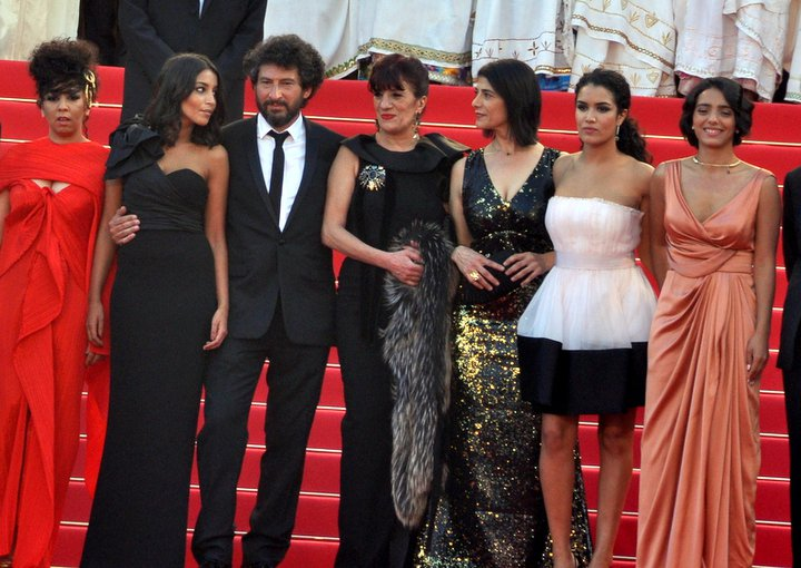 L'équipe du film "La source des femmes" au festival de Cannes. De gauche à droite : Amal Atrach, Leïla Bekhti, Radu Mihaileanu, Biyouna, Hiam Abbass, Sabrina Ouazani, Hafsia Herzi